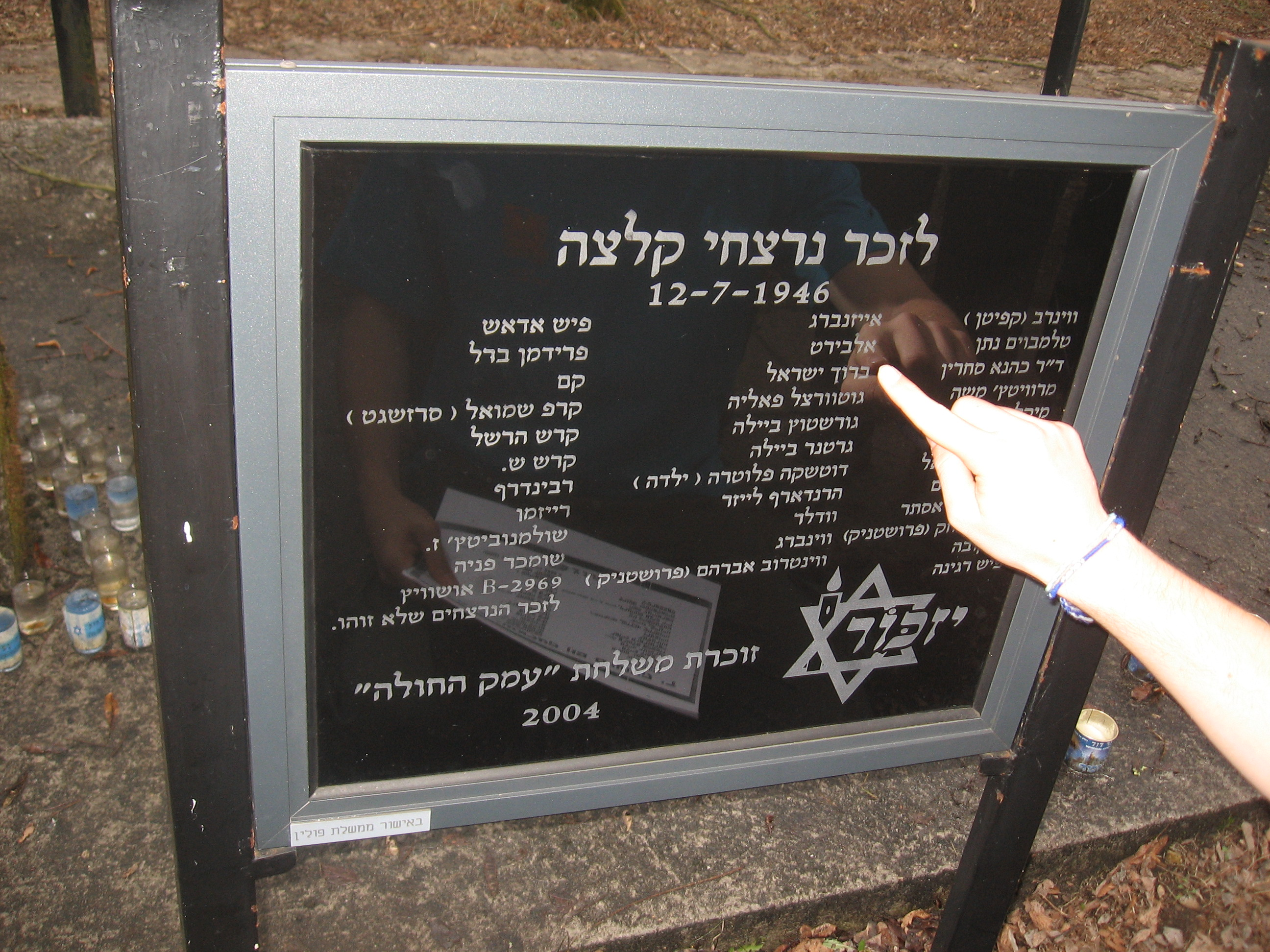 האנדרטה על קבר נרצחי פוגרום קיילצה